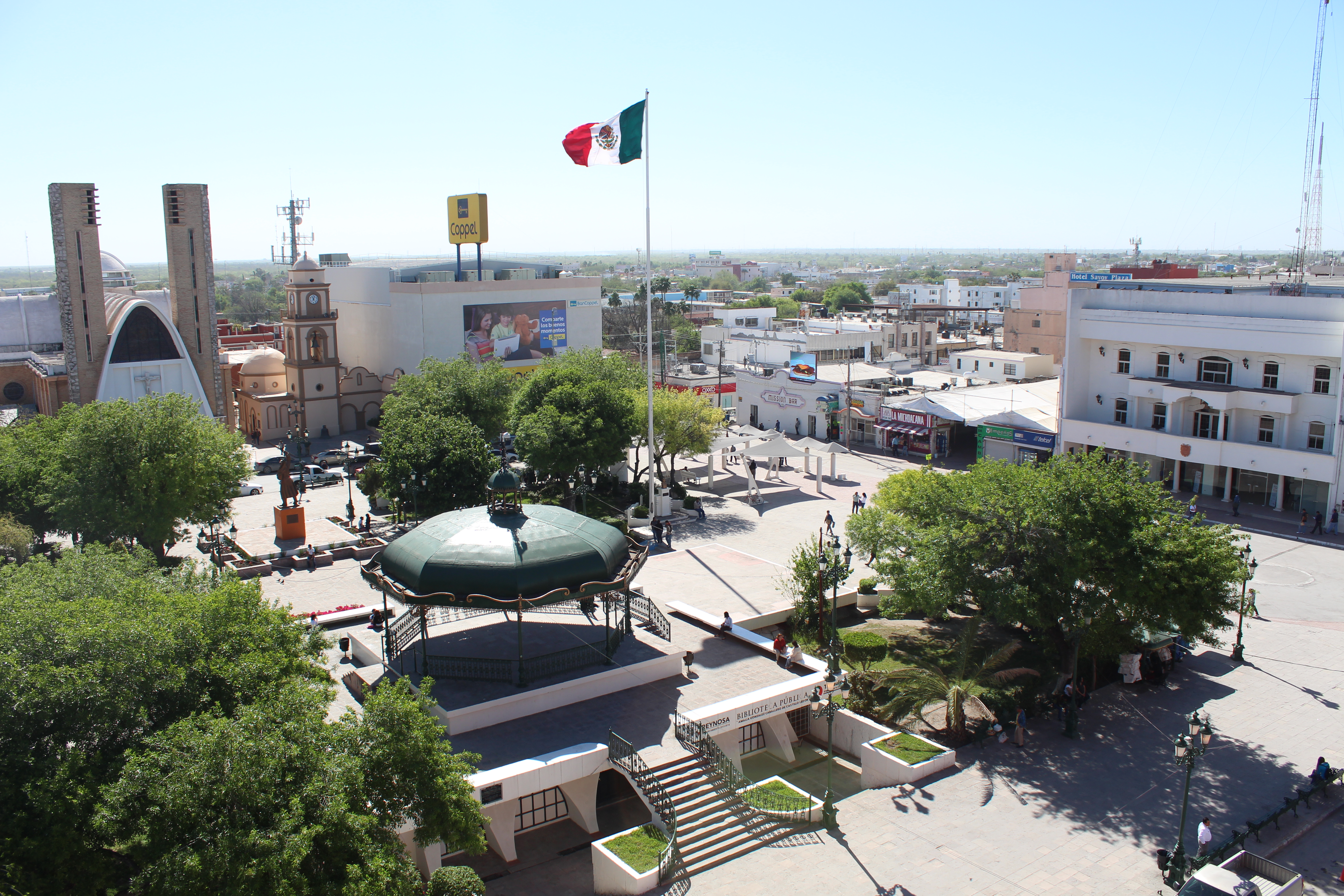 Una magnifica apreciacion de la plaza principal de Reynosa Tamaulipas donde se celebran año con año las festividades importantes para este municipio, en la imagen podemos observar 4 monumentos importantes como lo son el templo de Guadalupe, el palacio municipal, la estatua en honor a miguel hidalgo, y la biblioteca, sin dejar a un lado la bandera de Mexico endeando en lo mas alto del asta.